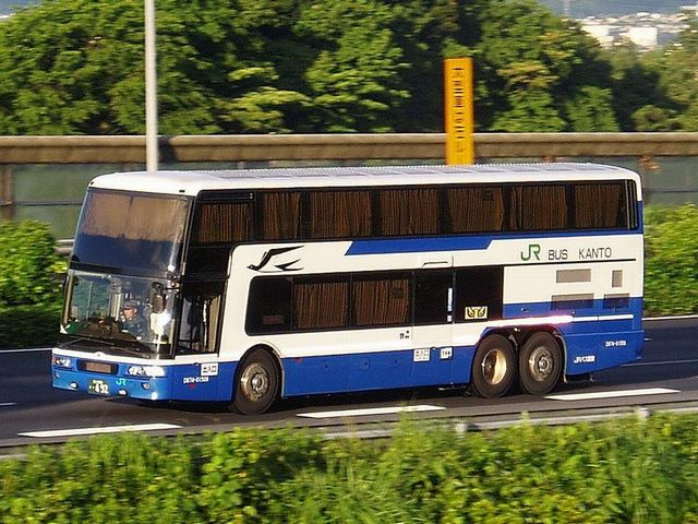 JR Bus Kanto D674-01508 "Dream Osaka" Mitsubishi MU612TX on Tomei Expway